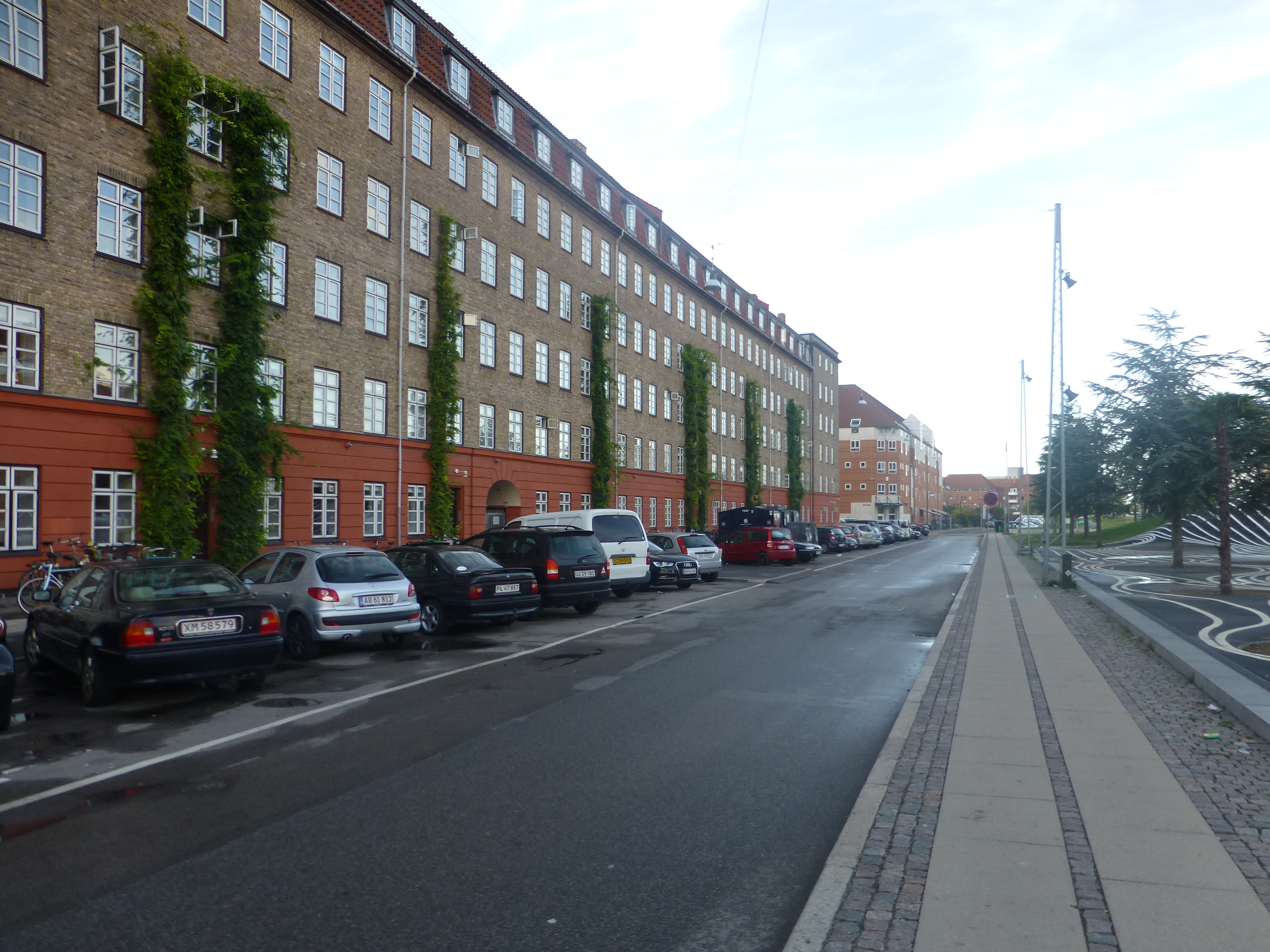 The street Midgårdsgade in Nørrebro in Copenhagen.